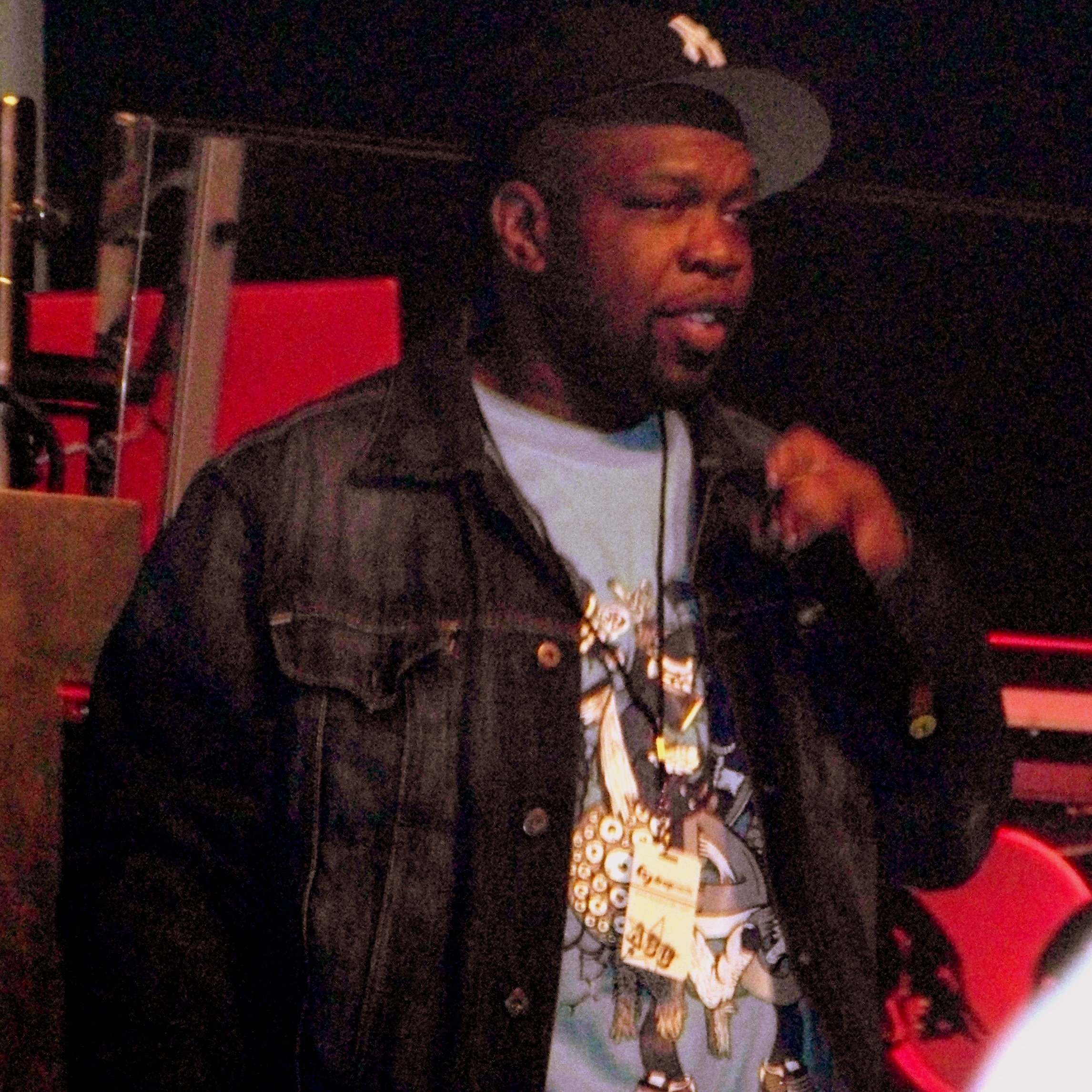 Rapper Jeru the Damaja.